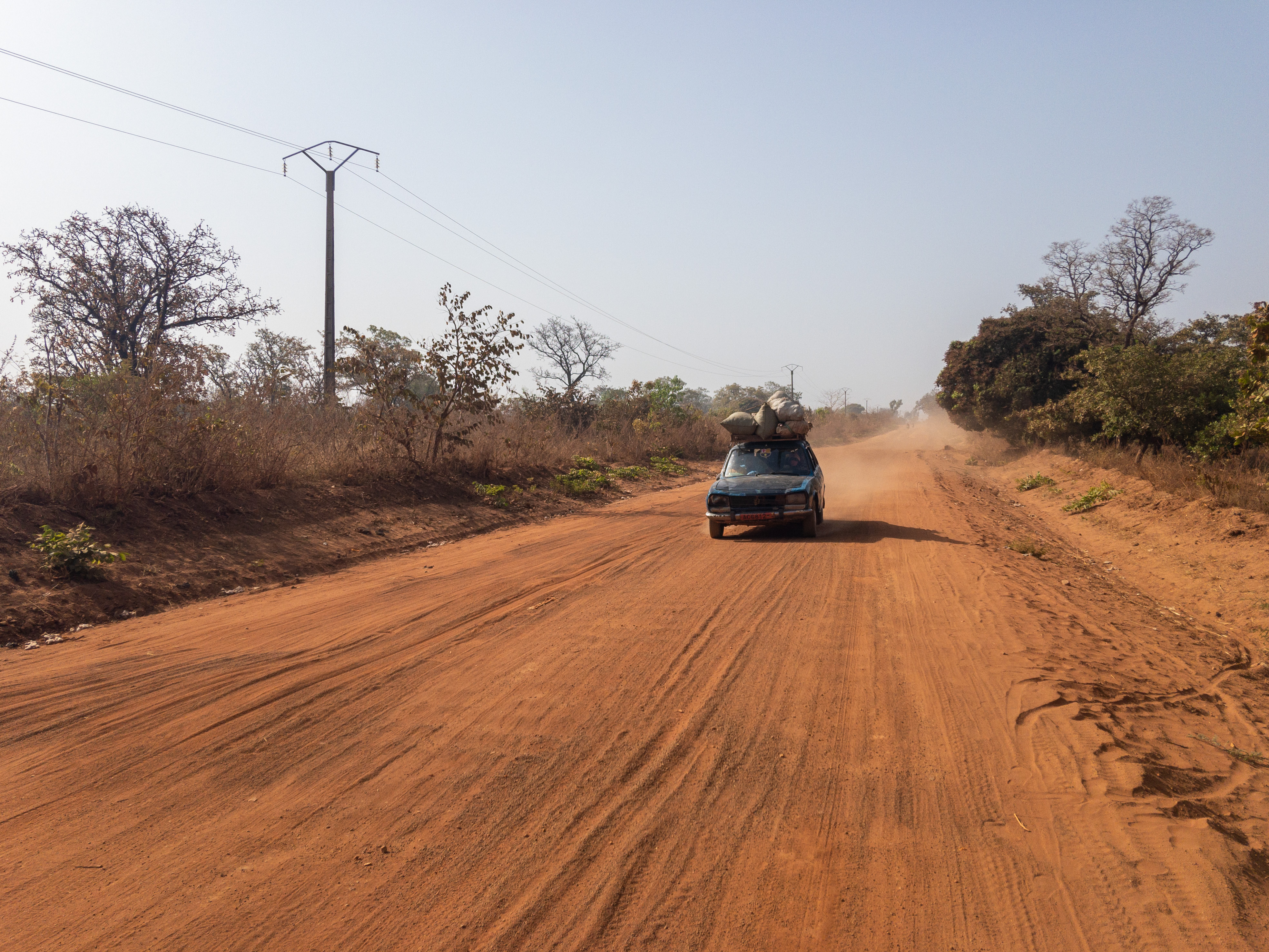 Taxi brousse sur une piste au nord du Bénin This is an image with the theme "Africa on the Move or Transport" from: Benin